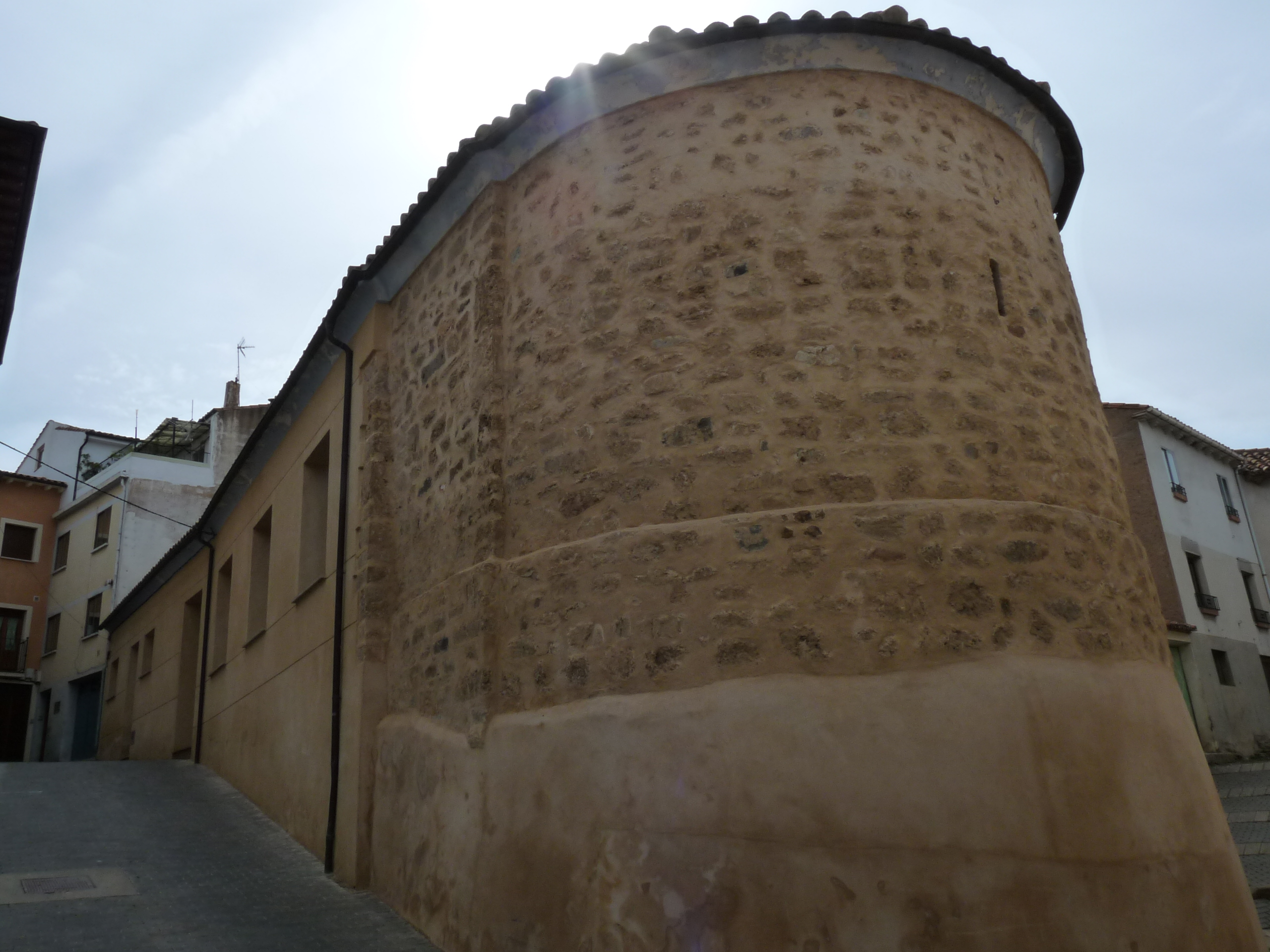 Ágreda - Iglesia románica del siglo XII, construida sobre una antigua sinagoga judía